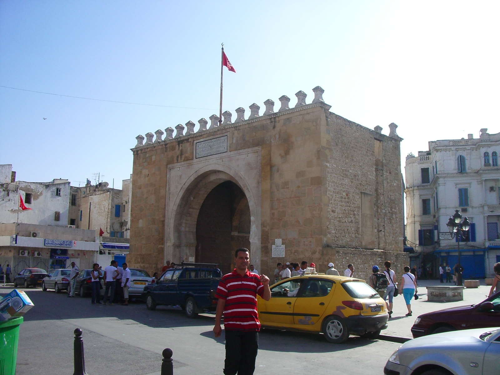 Bab Bahr